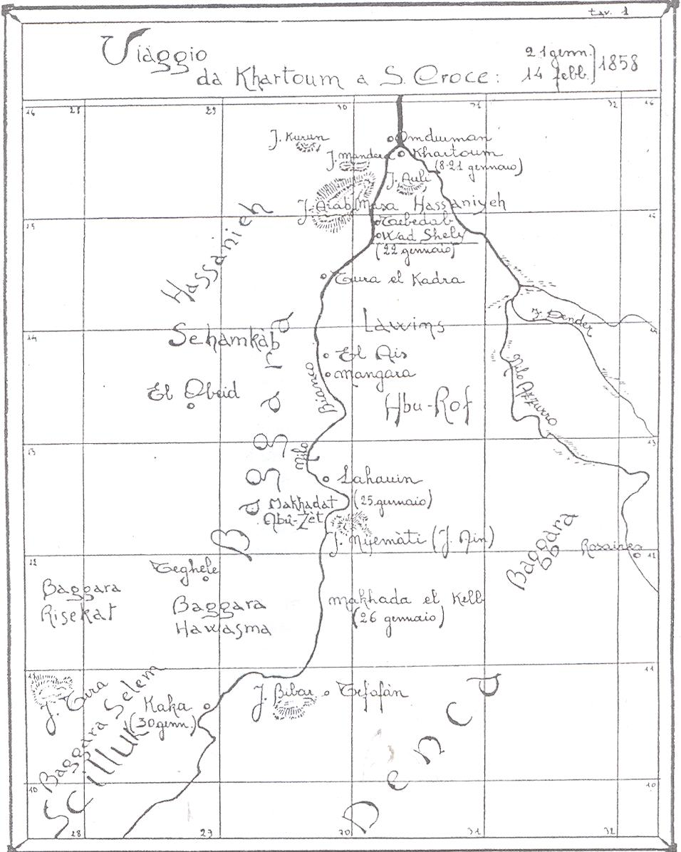 Regioni dell'Alto Nilo Bianco - Carta geografica manoscritta